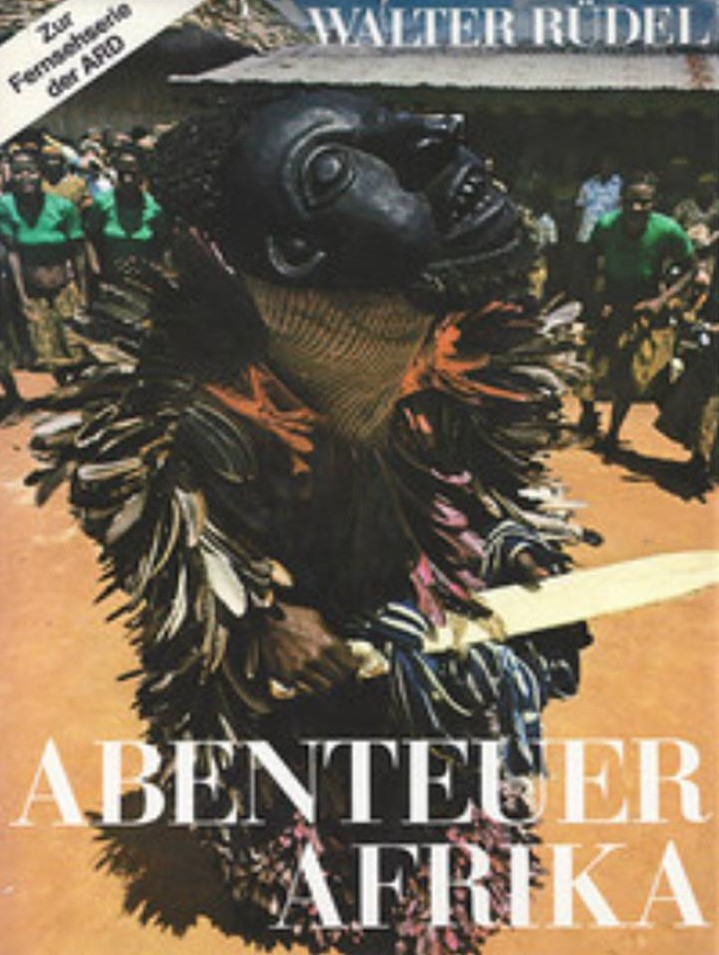 Umschlag "Abenteuer Afrika" von Walter Rüdel